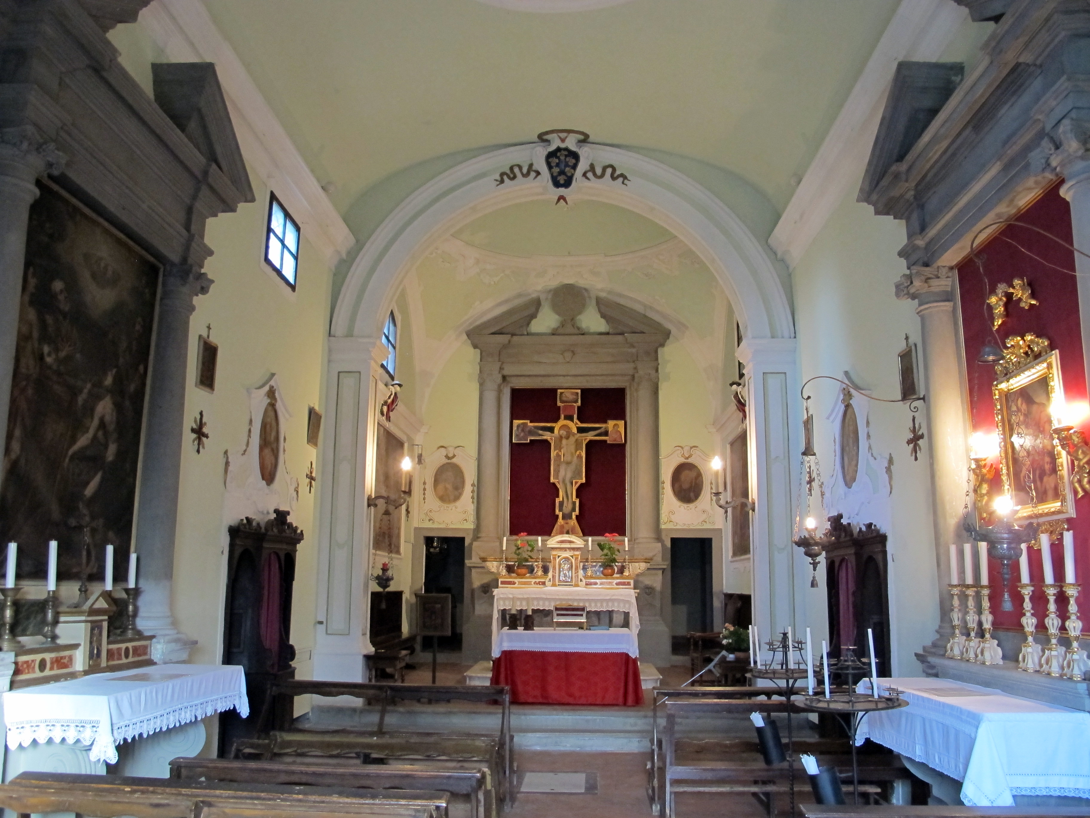 Ruballa, Bagno a Ripoli